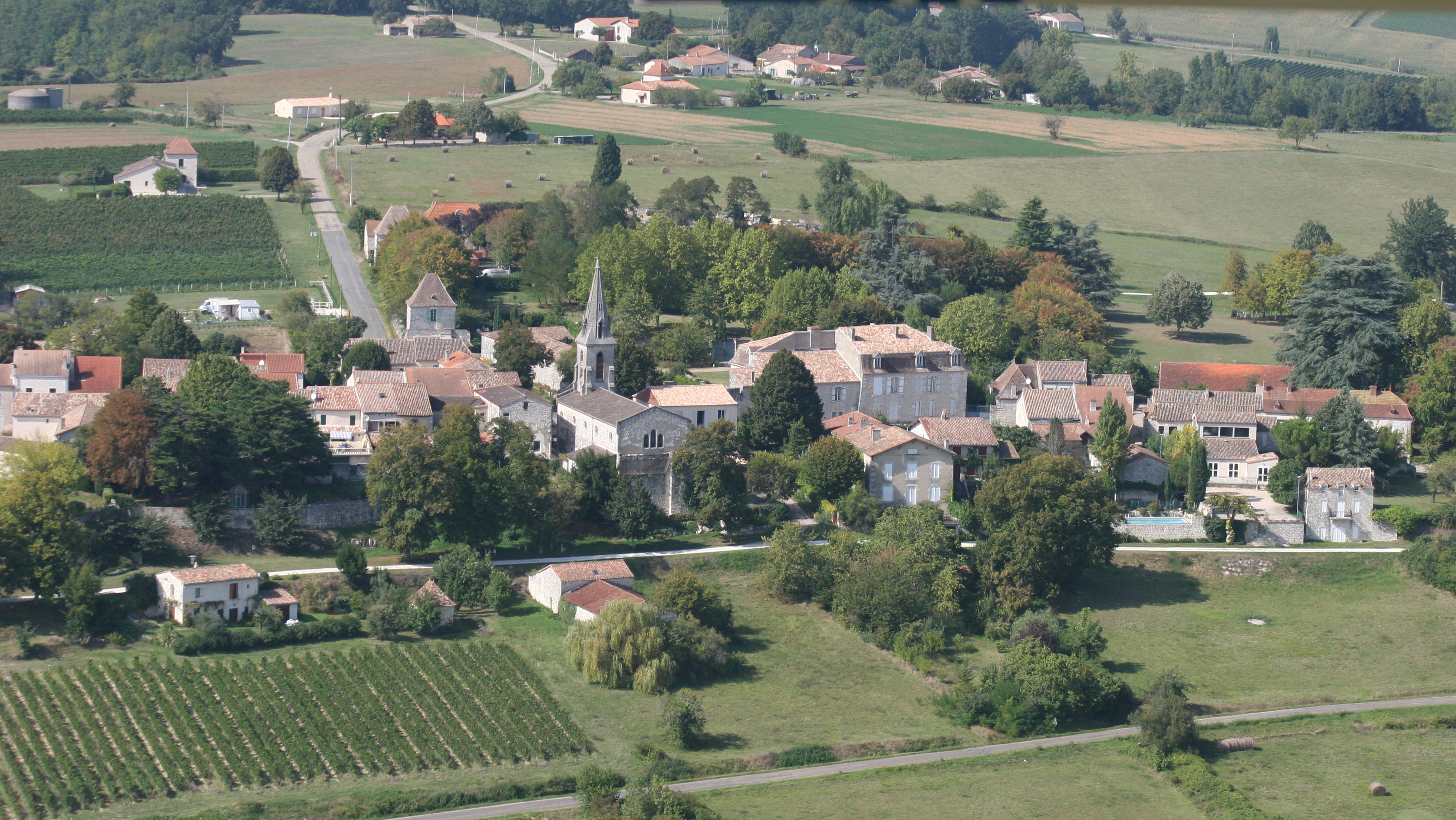 Vue aérienne de Soumensac.